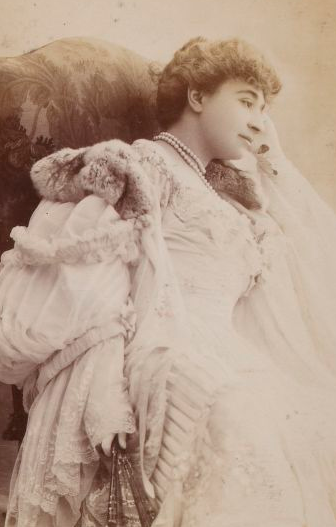 Portrait de Berthe de Choudens (Cerny)